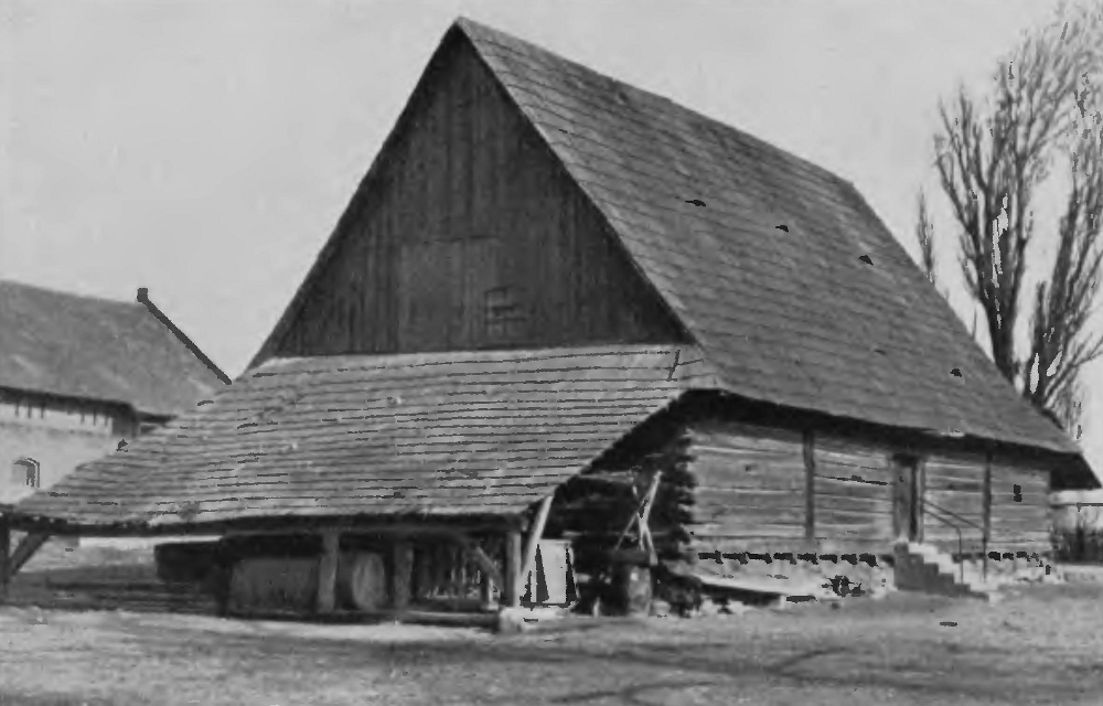 Dominialspeicher aus Schrotholz in Rachowitz in Oberschlesien.